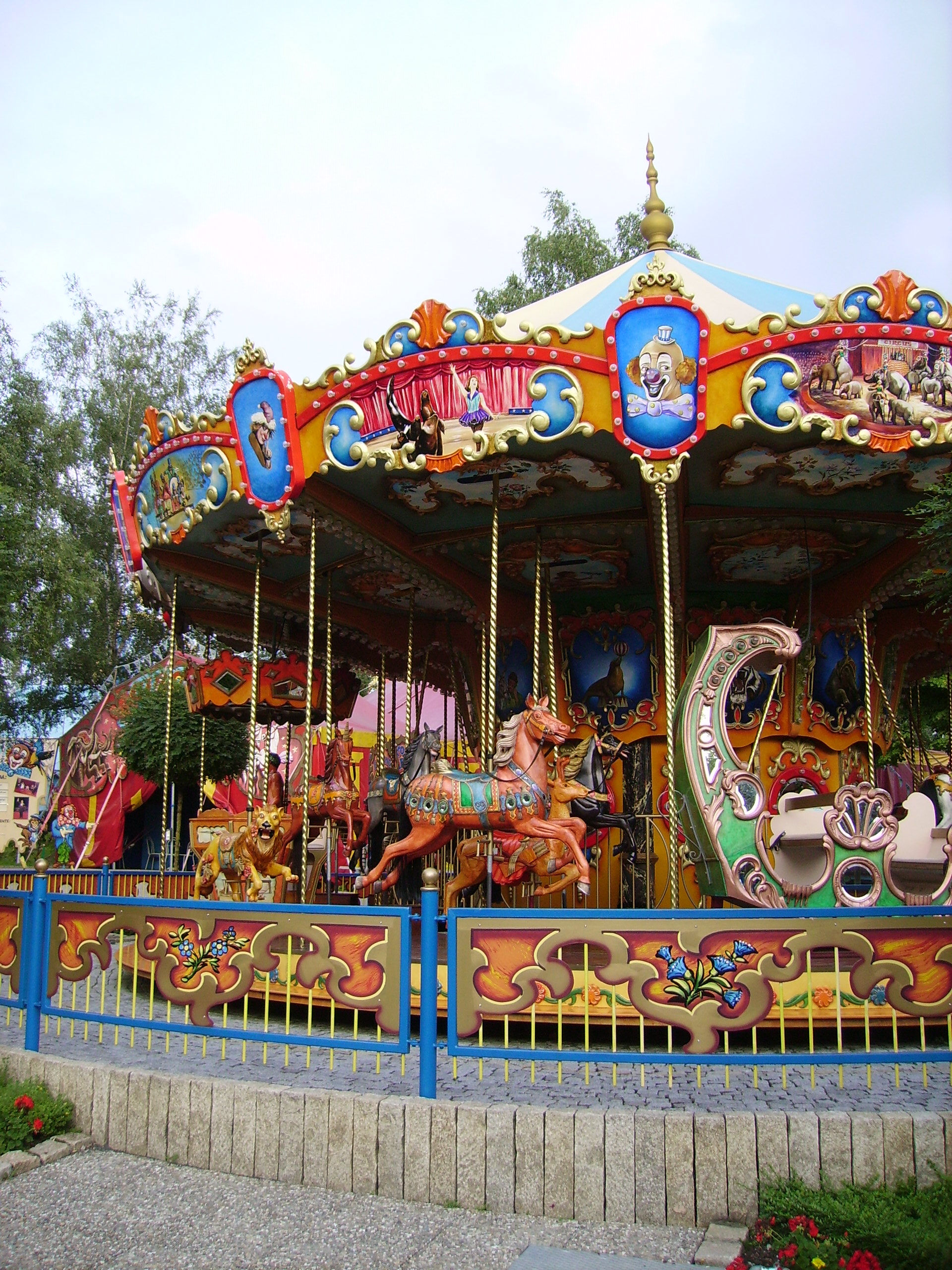 Freizeit-Land Geiselwind near Geiselwind in Franconia (Germany)